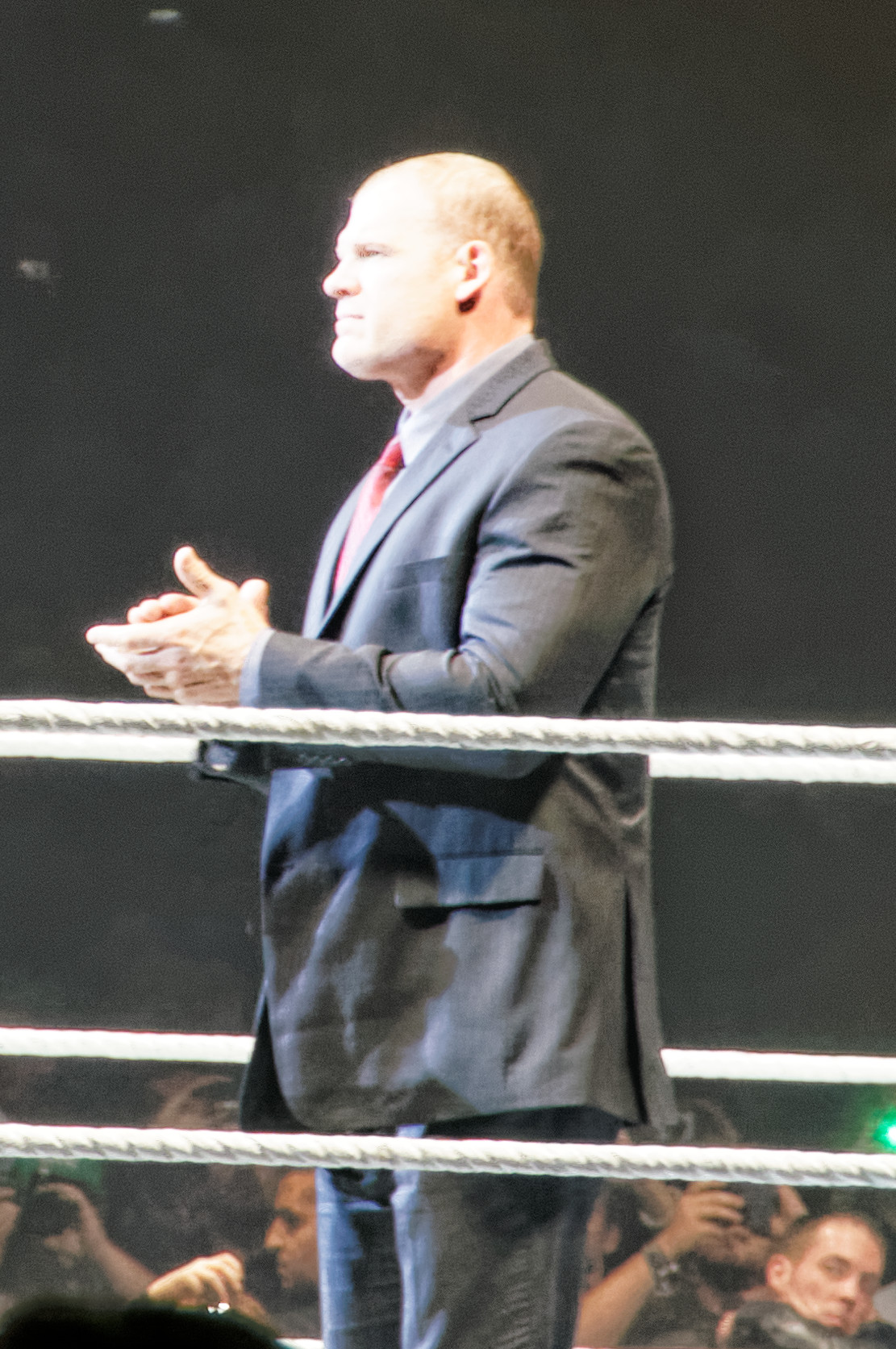 Suit